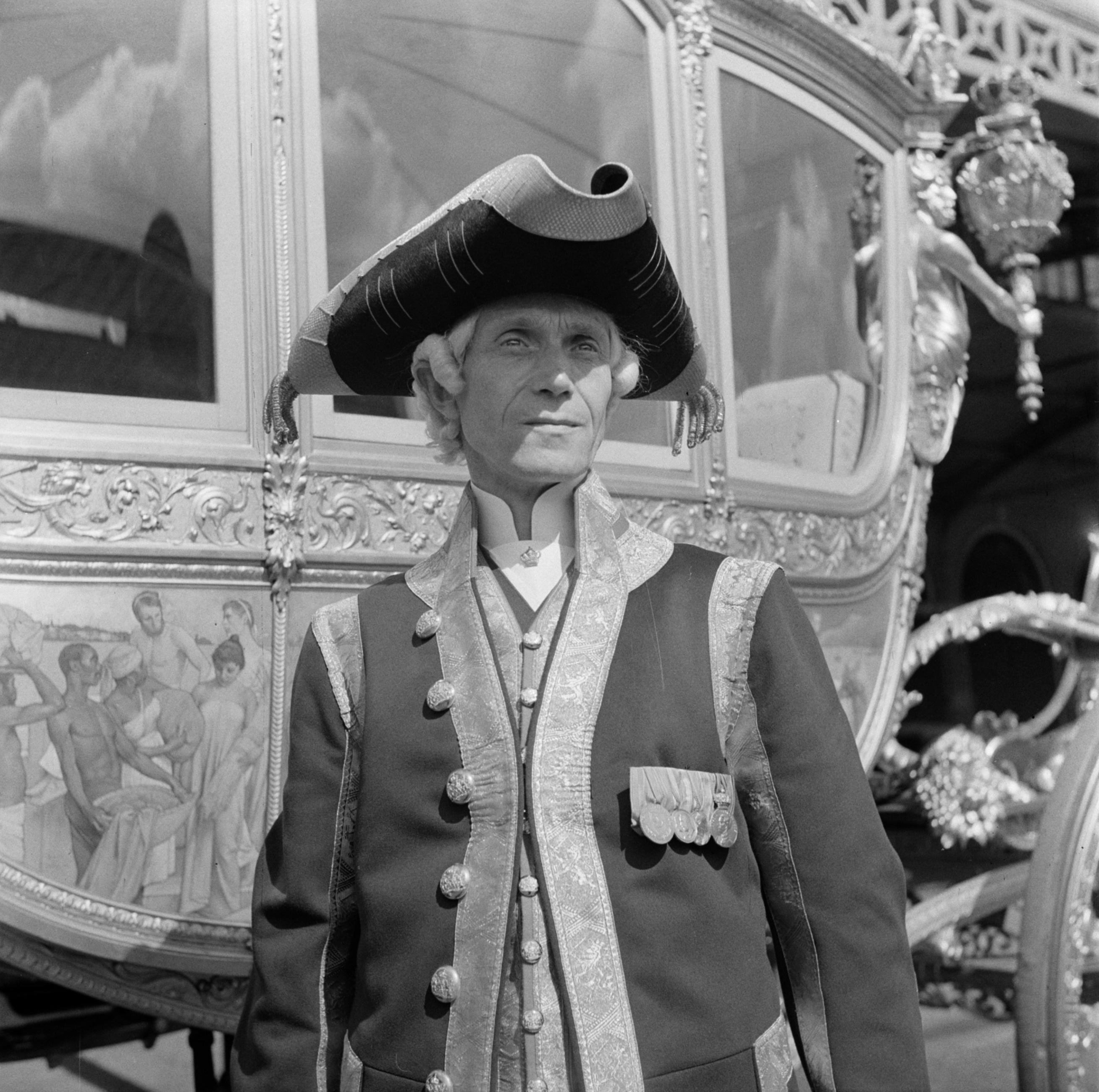 Collectie / Archief : Fotocollectie Van de Poll Reportage / Serie : Troonsafstand koningin Wilhelmina / Inhuldiging van koningin Juliana Beschrijving : Voorbereidingen. Repetitie met de Gouden Koets, waarvan hier de 1e koetsier van het Koninklijk Staldepartement in Den Haag, J.L. Lammers, die de koets reed op 6 september in Amsterdam. Datum : september 1948 Locatie : Den Haag, Zuid-Holland Trefwoorden : inhuldigingen, koetsen, koetsiers, koninklijk huis, repetities Persoonsnaam : Lammers, J.L. Instellingsnaam : Koninklijk Staldepartement Fotograaf : Poll, Willem van de Auteursrechthebbende : Nationaal Archief Materiaalsoort : Negatief (zwart/wit) Nummer archiefinventaris : bekijk toegang 2.24.14.02 Bestanddeelnummer : 255-7202 Reacties Geplaatst door C.A. van Zwet op 09 december 2006 - 16:13. J.L. Lammers (Jacobus Lodewicus, roepnaam Koos) was op 1 februari 1961 40 jaar in dienst bij het Koninklijke Staldeparment als koetsier-majoor.